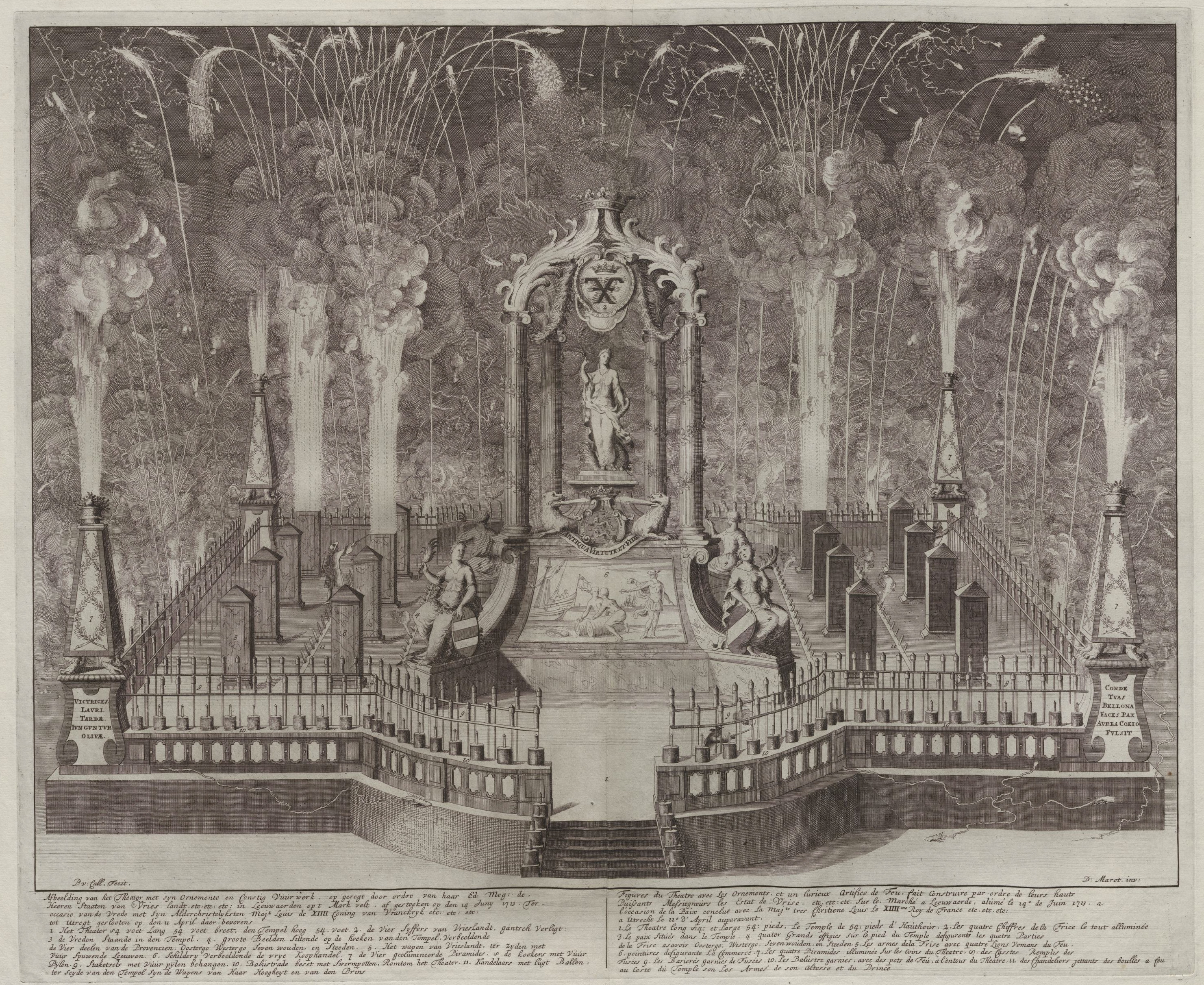 Grafik aus dem Klebeband Nr. 10 der Fürstlich Waldeckschen Hofbibliothek Arolsen Motiv: Feuerwerk der friesischen Stände auf dem Markt zu Leeuwarden, 14. Juni 1713, aus Anlass des Friedens von Utrecht